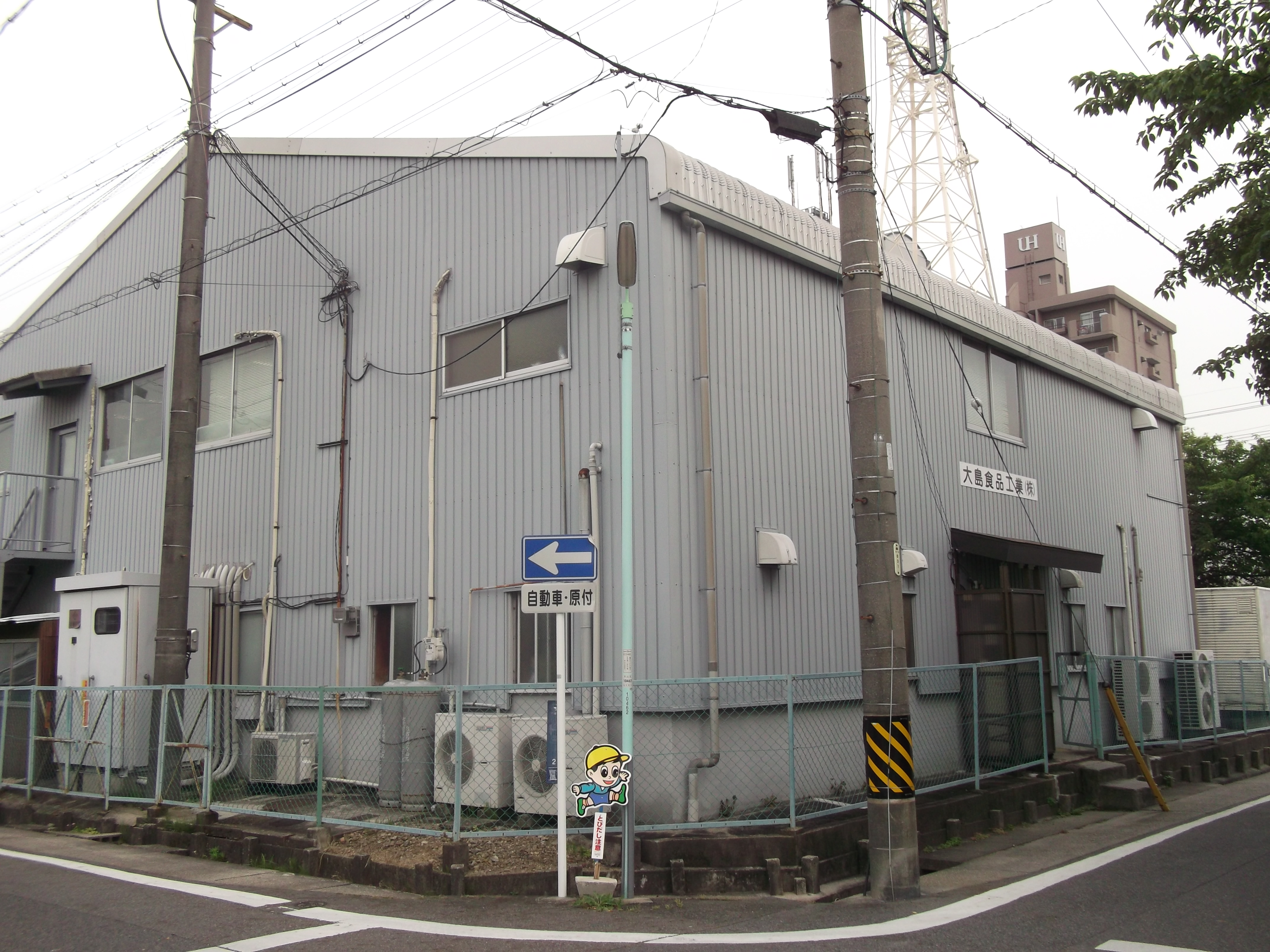 名古屋市守山区の大島食品工業守山工場を西側公道北側より写す